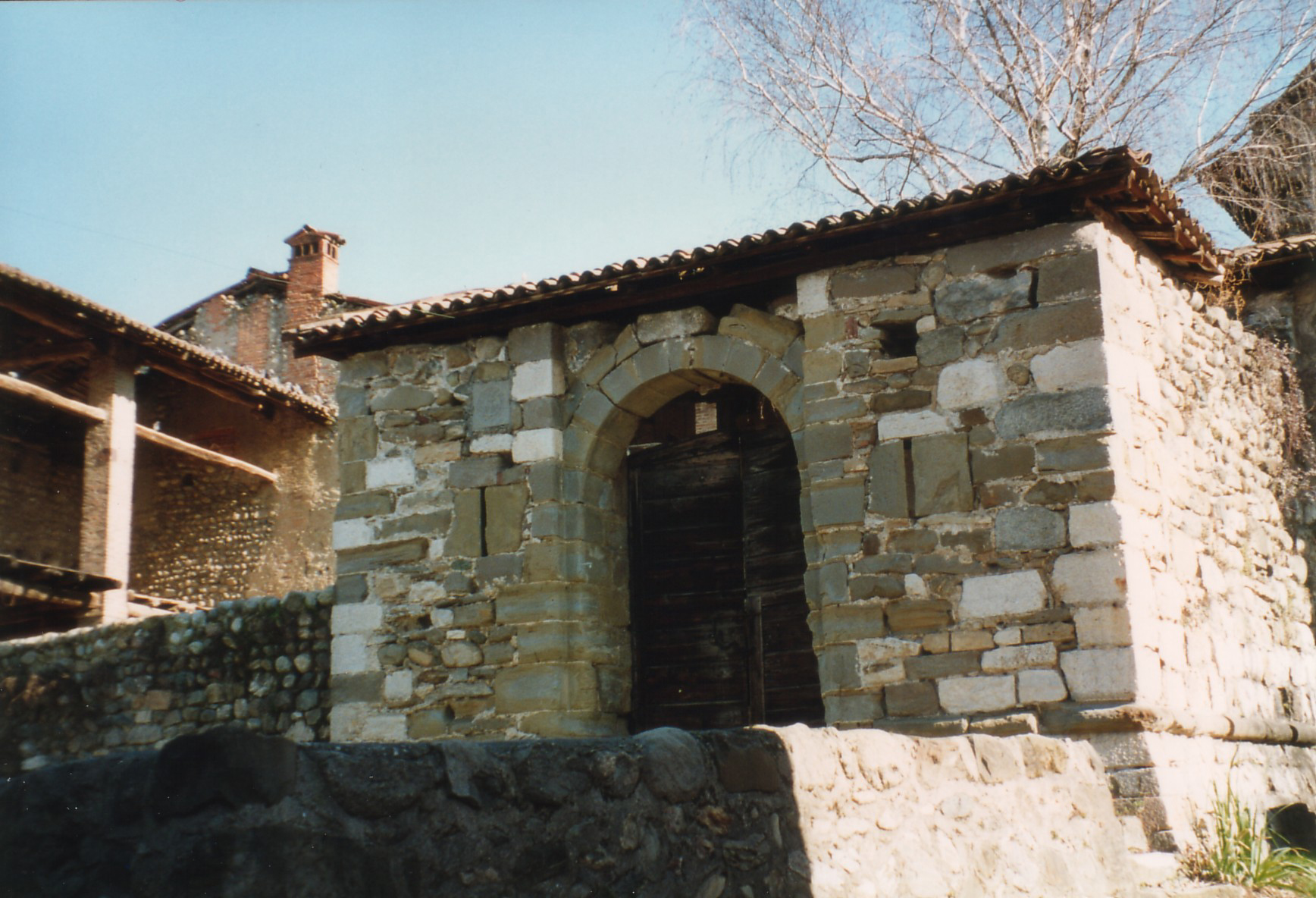 Quel che rimane del castello natio di Bartolomeo Colleoni. Solza, Bergamo. Autore Giorces.